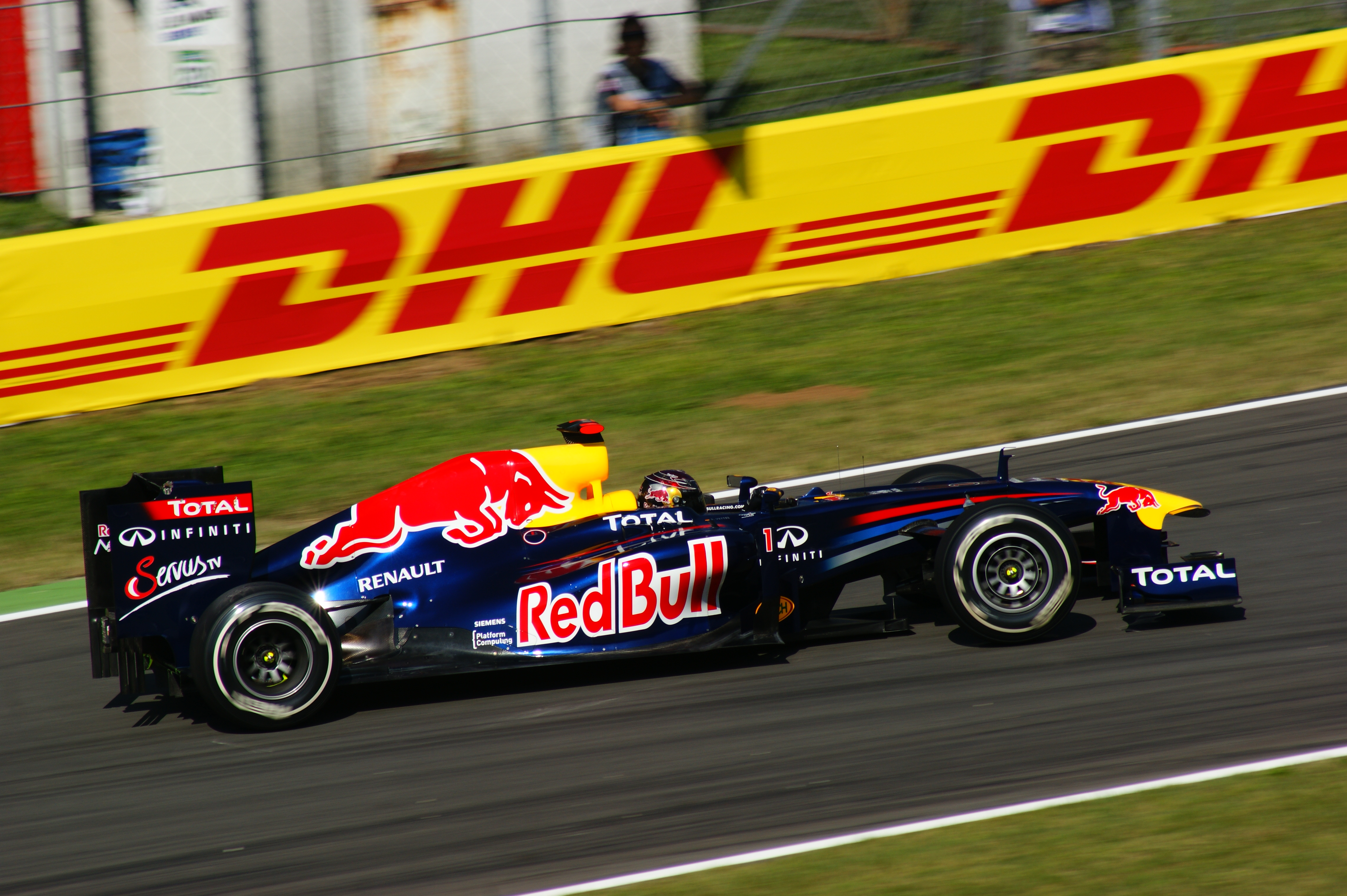 Sebastian Vettel alla prima variante Monza 2011